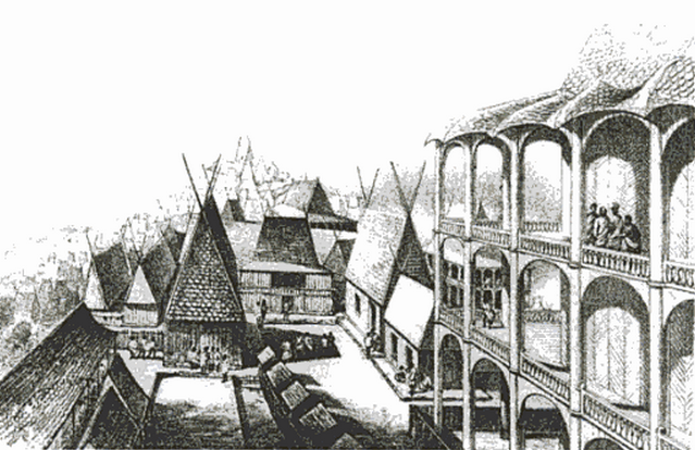 19e eeuwse illustratie uit Maisons royales, demeures des grands à Madagascar (Karthala Éditions, 2005) door Didier Nativel